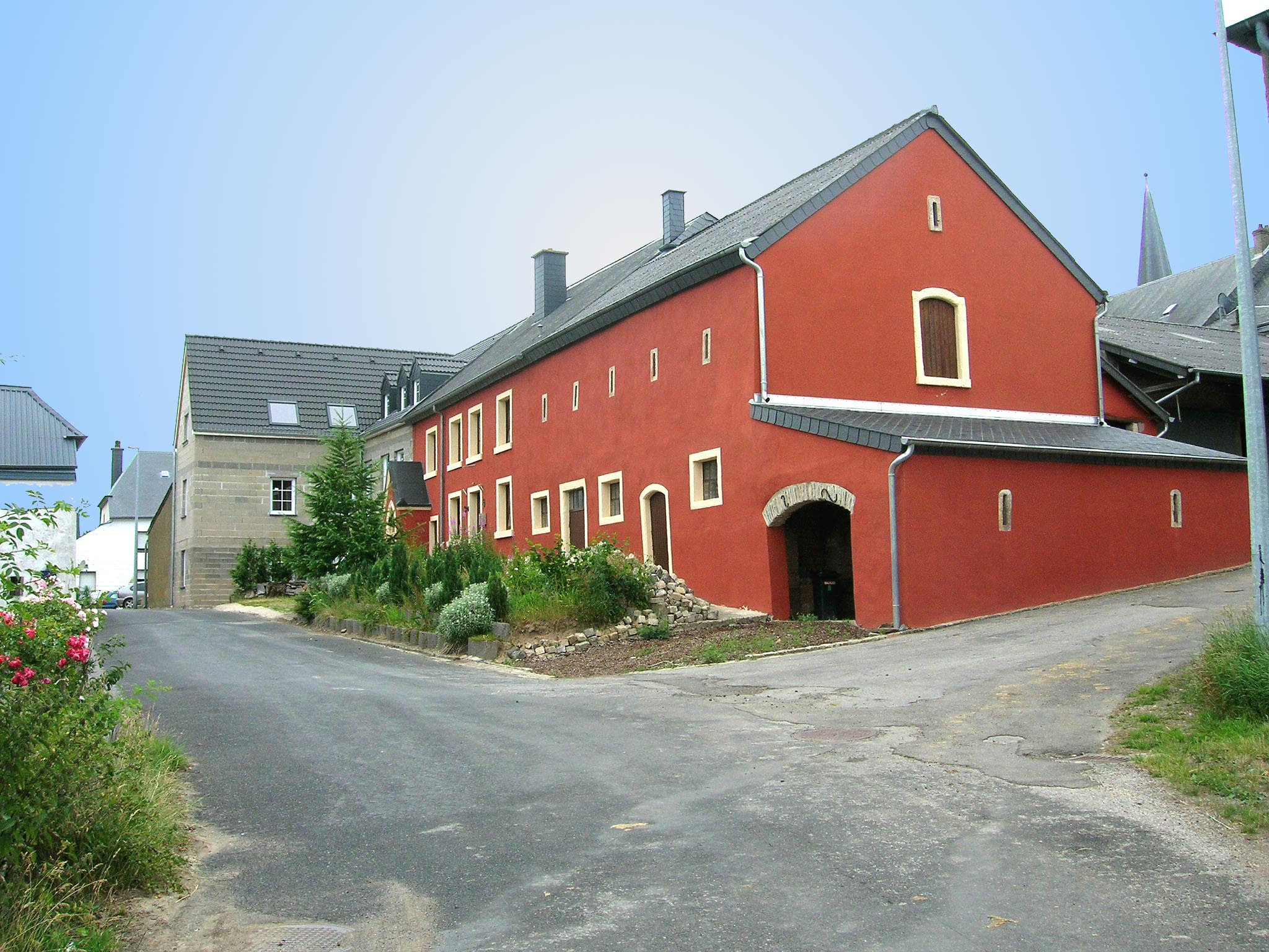 Eschduerf: Henneschten Eck (2006)